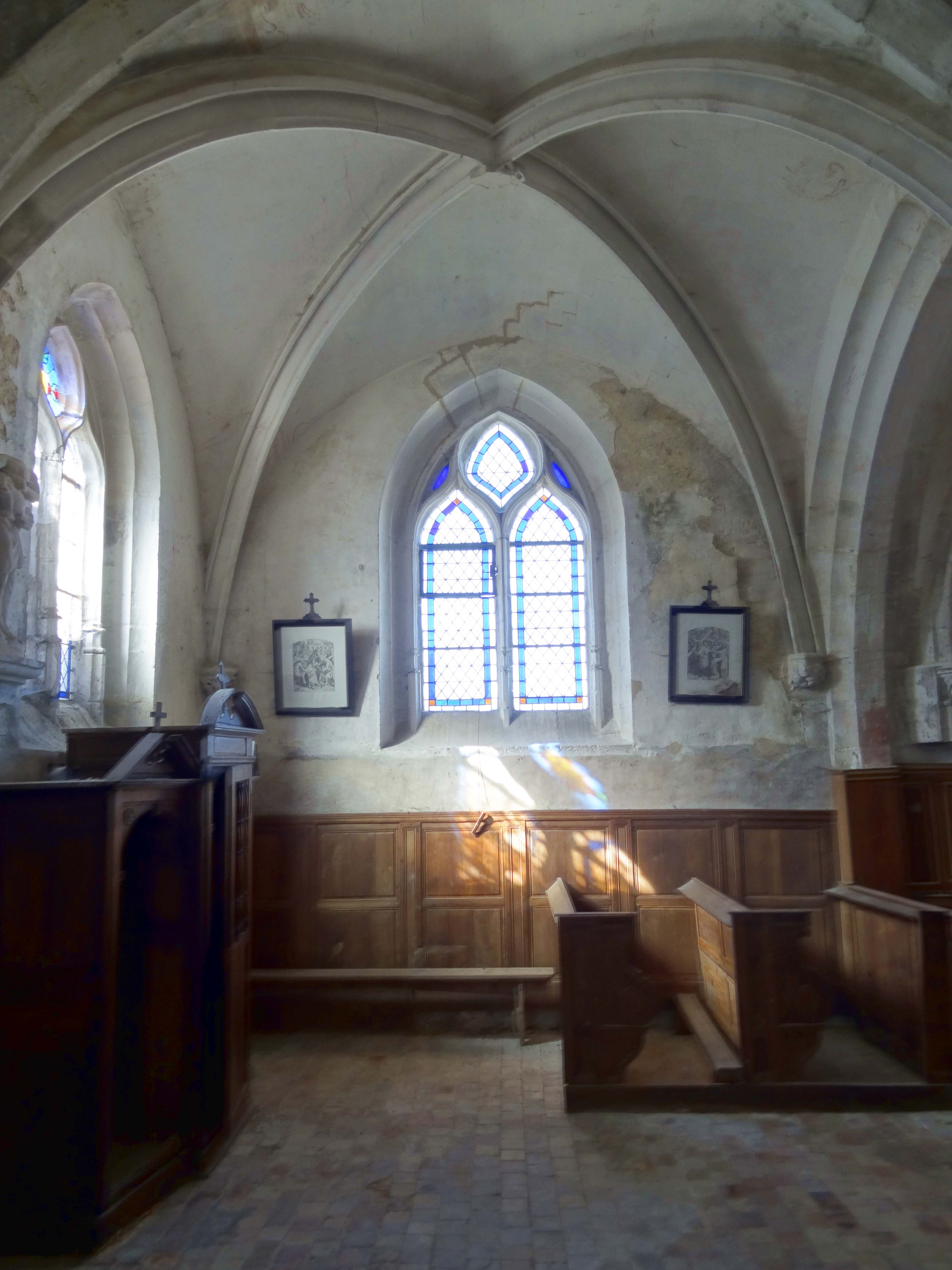 Intérieur de l'église - voir titre.